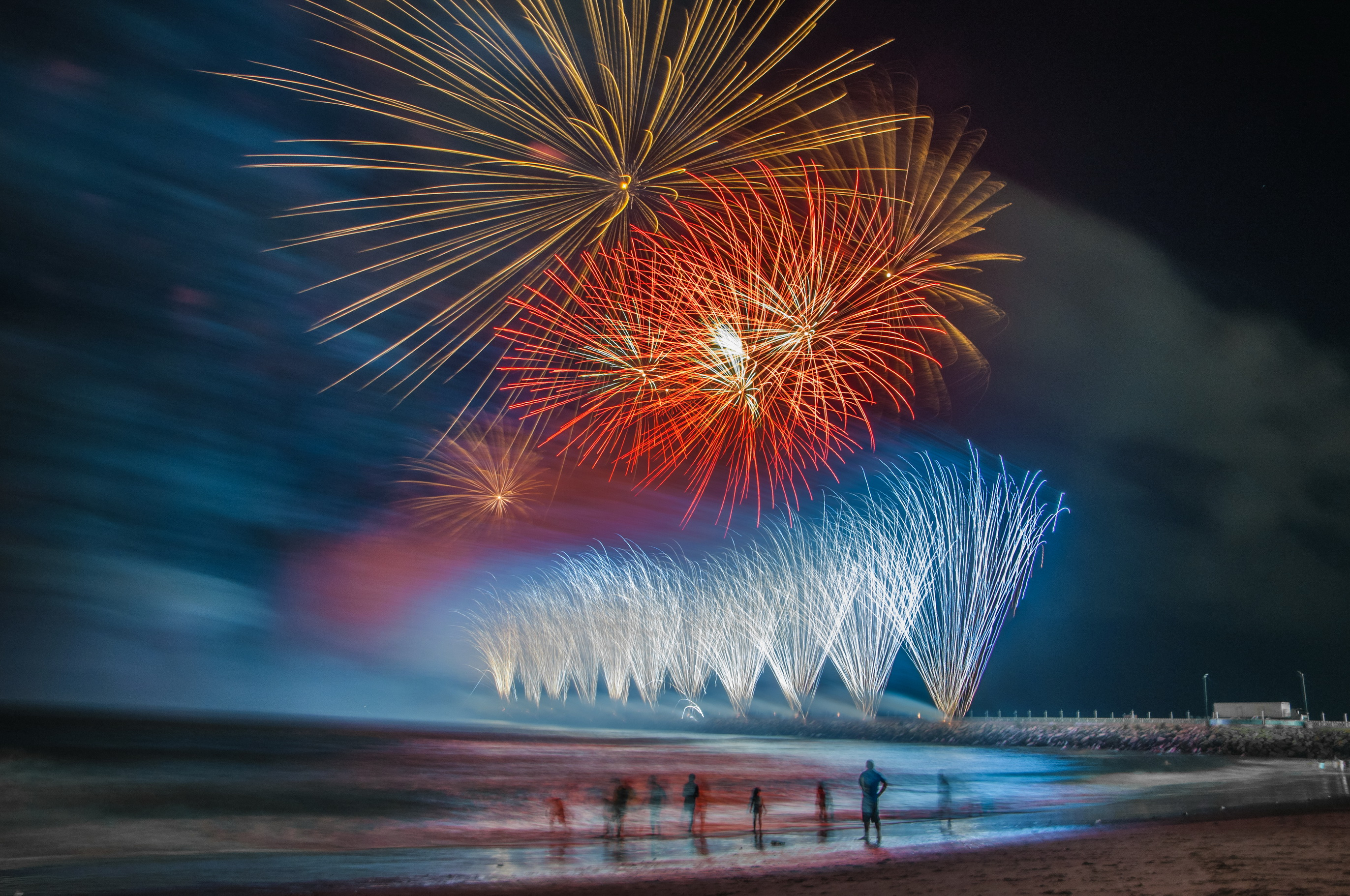 Beira Mar Fortaleza/Ce